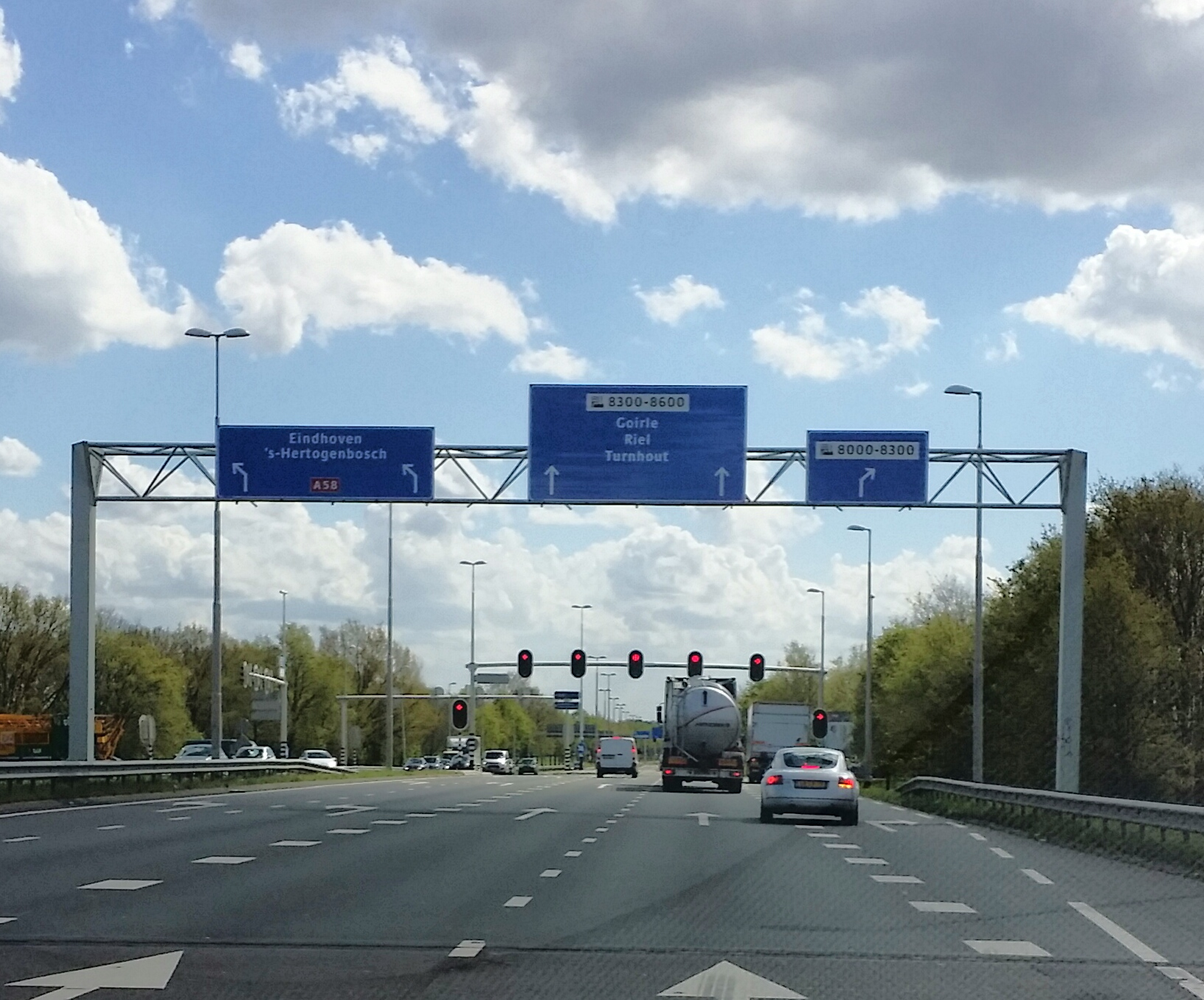 De oude provinciale weg N630 bij Goirle, richting Poppel